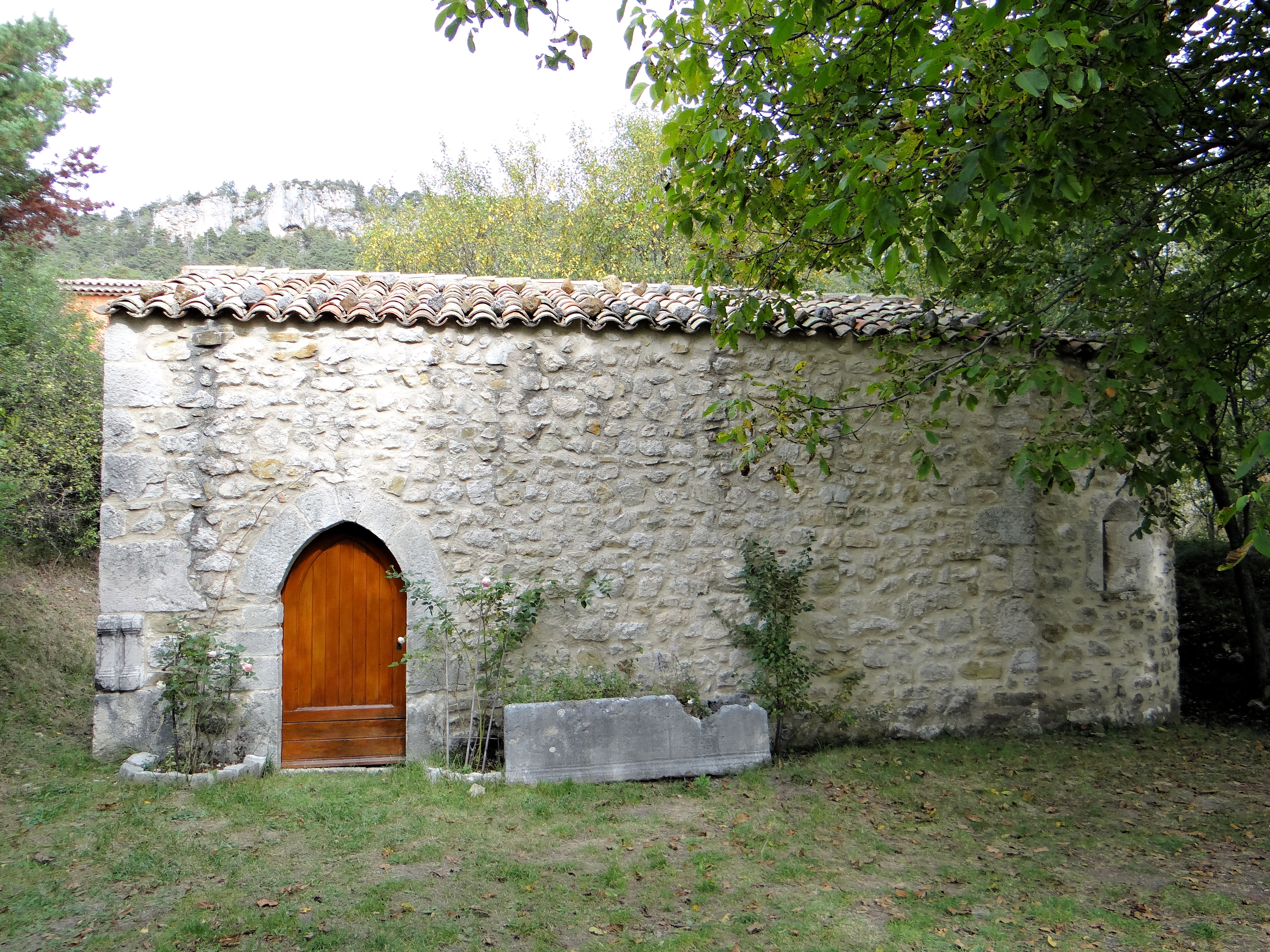 Valderoure - Chapelle Saint-Léonce - Ensemble de la façade sud .